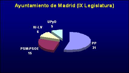 Composición del Ayuntamiento de Madrid desde el 11 de junio de 2011